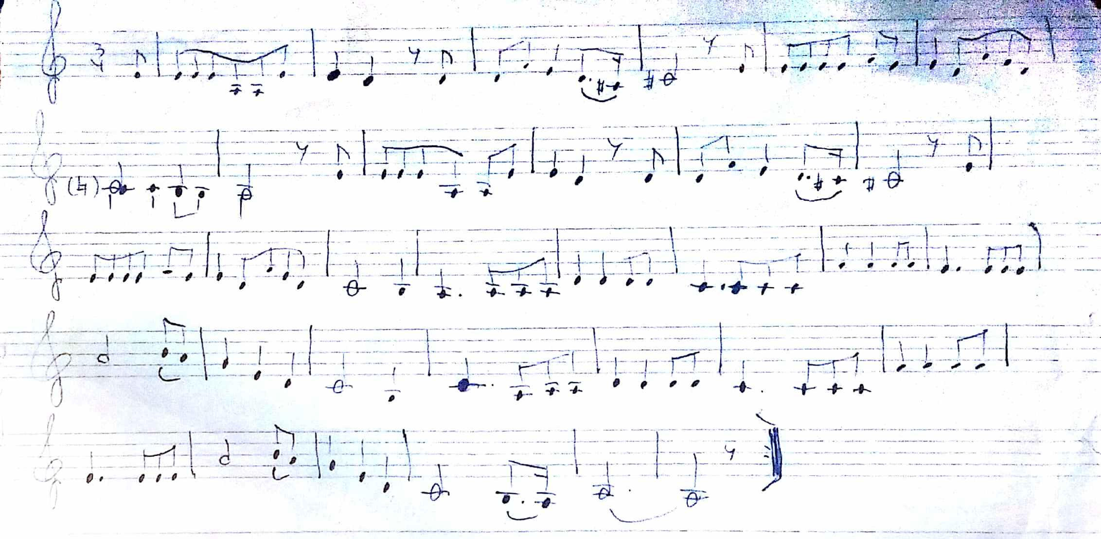 ירושלים של זהב תווים בכתב ידה של נעמי שמר